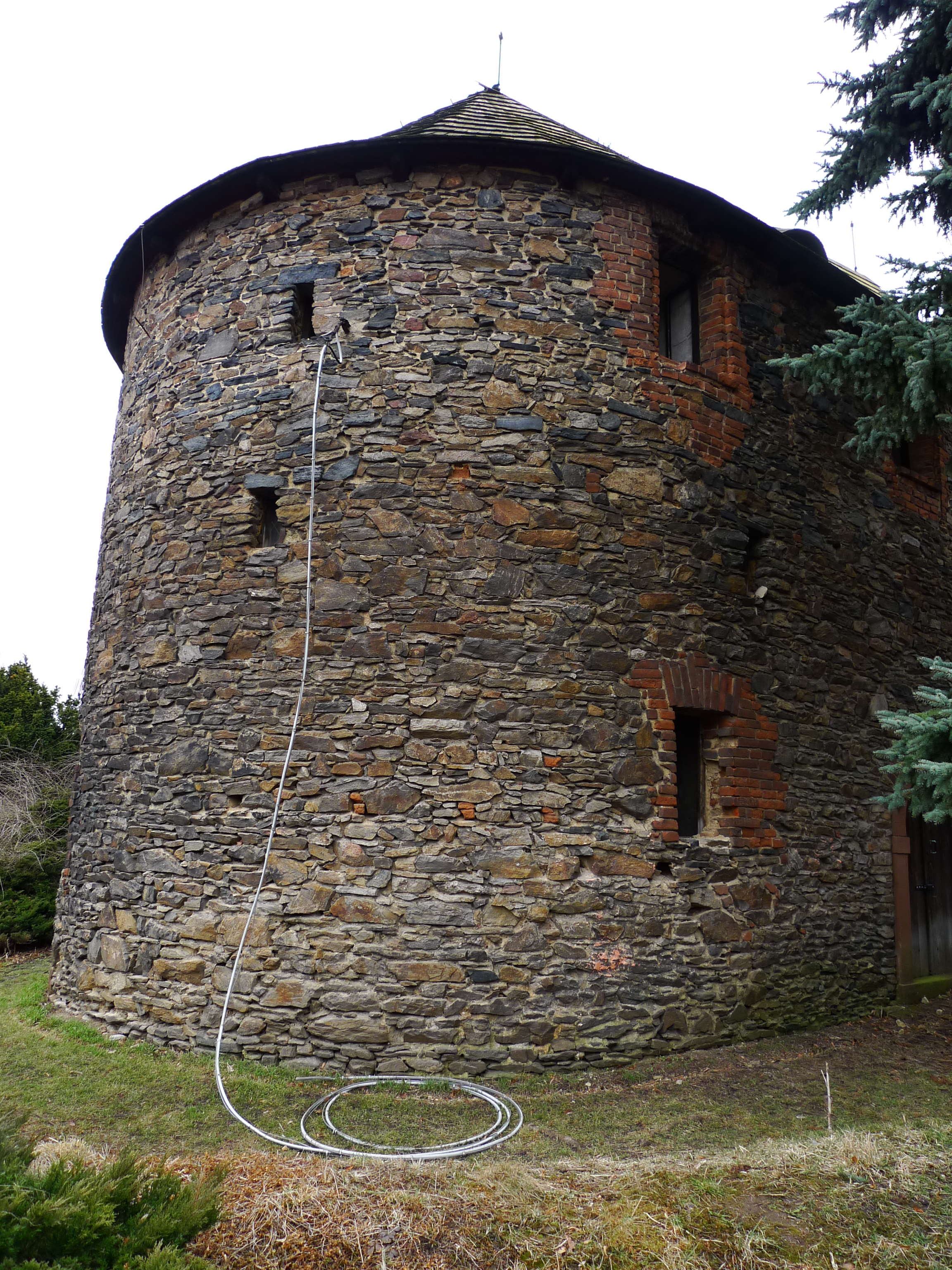 Městské opevnění (Kouřim), Kouřim